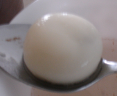 Auteur: Utilisateur:Sparkles